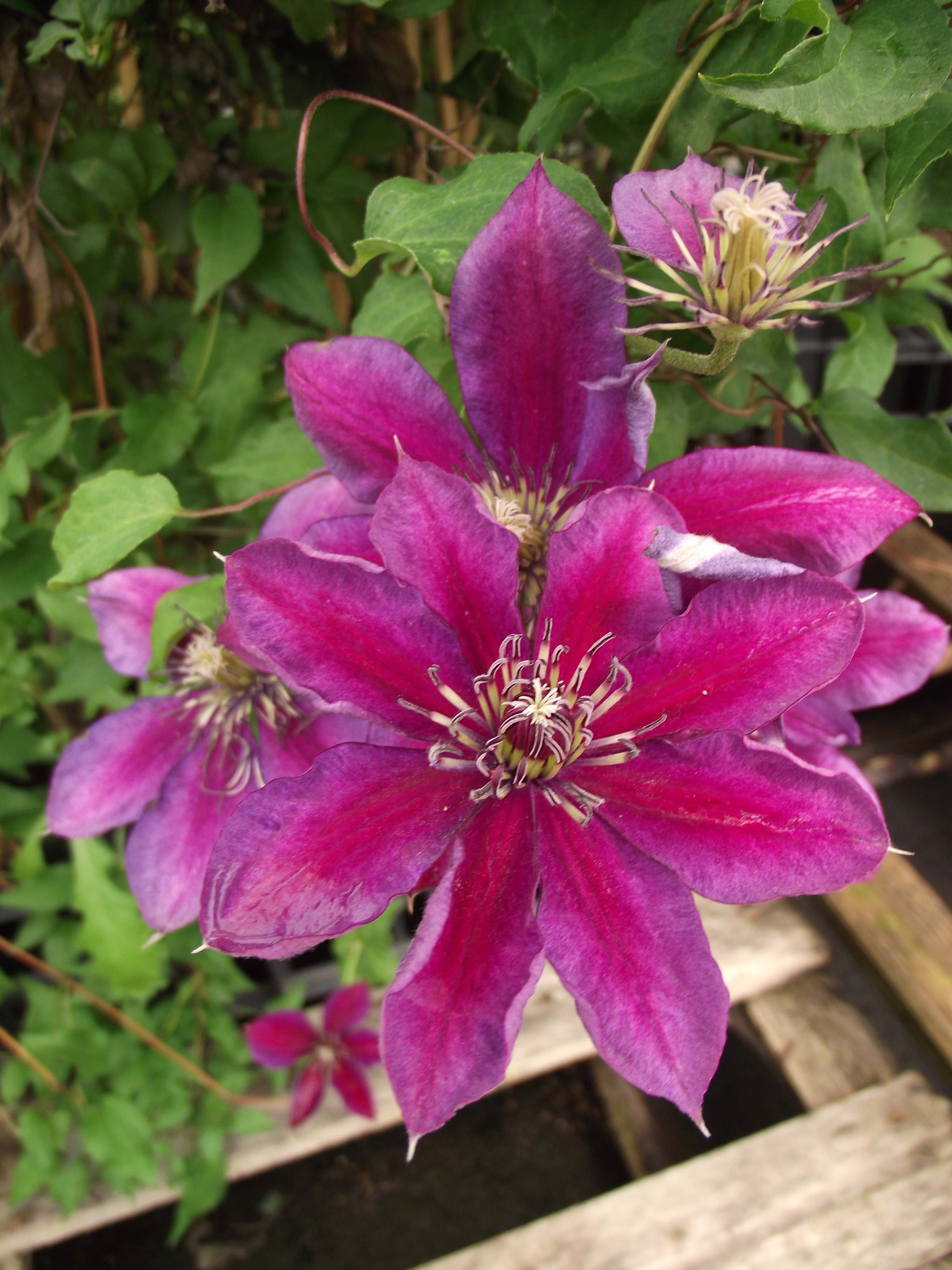 clematite patens temptation zotemp 2